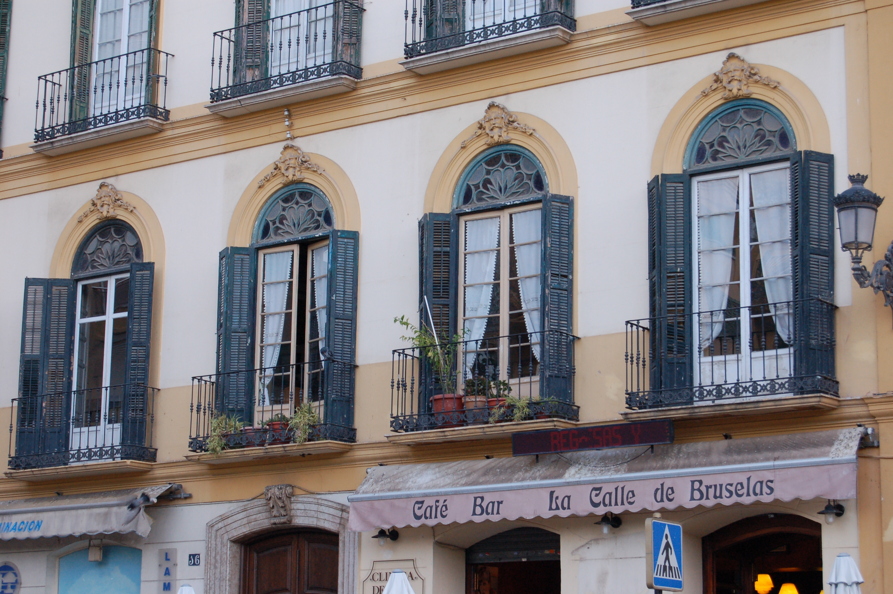 Near to Casa Natal de Pablo Ruiz Picasso